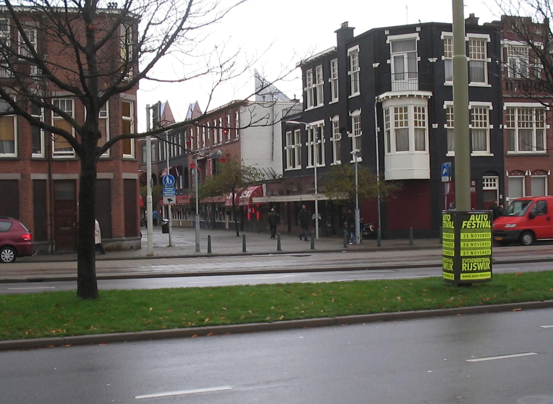 eigen opname. Geleenstraat gezien vanaf zijde Rijswijkseplein. categorie:afbeelding Den Haag